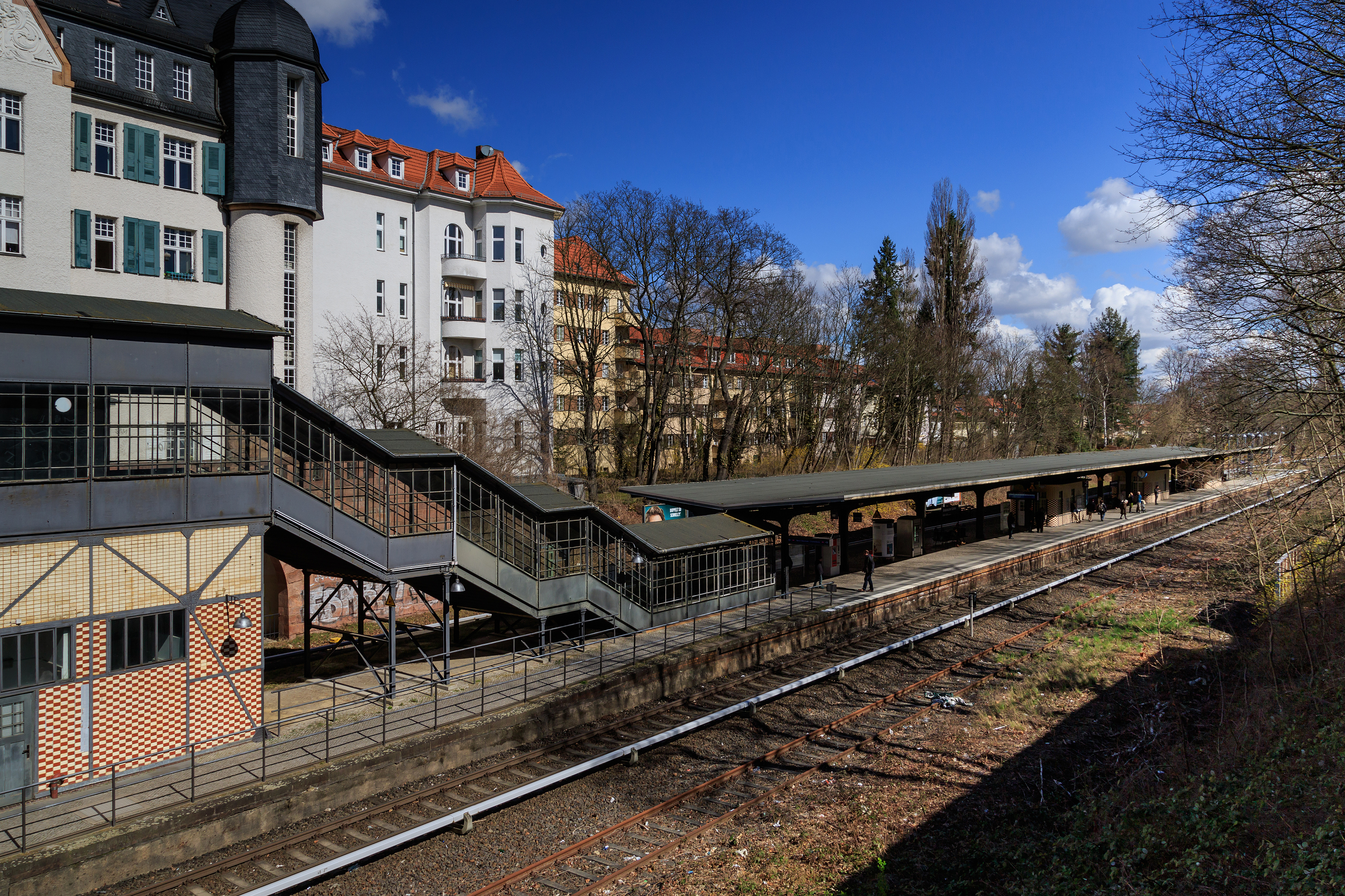 Die S-Bahn-Station Botanischer Garten in Berlin